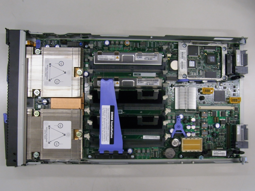 IBM_BladeCenter_HS21_8853_